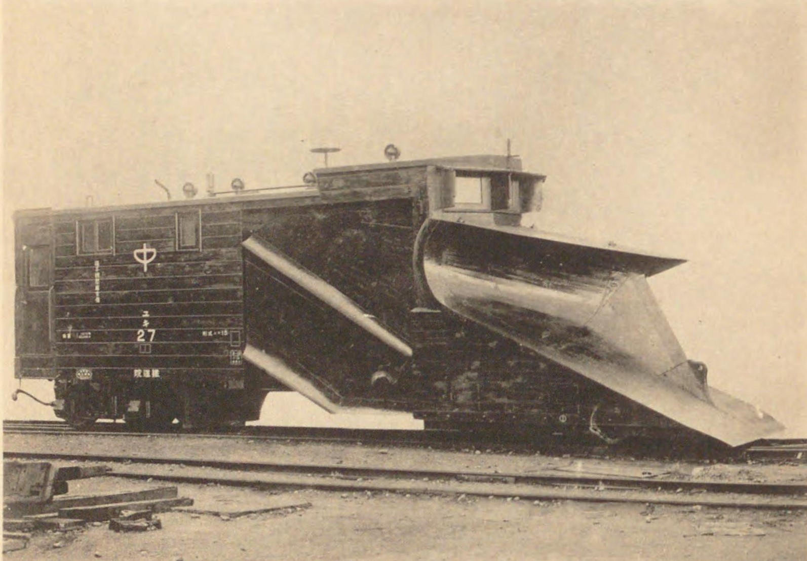 木製単線用ラッセル式雪かき車である国鉄ユキ15形貨車（後のキ1形）。